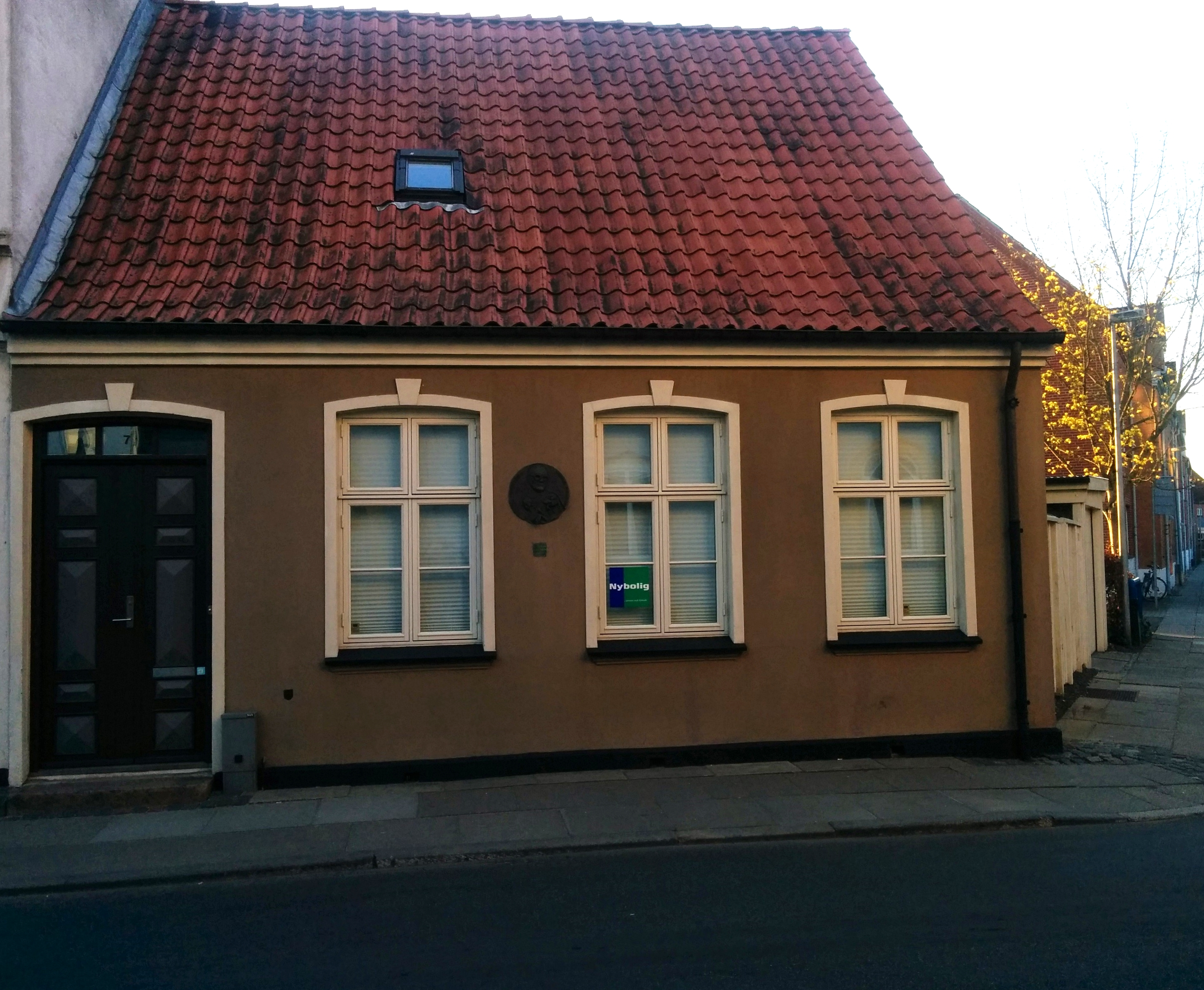 Jacob Gades barndomhjem, tæt ved Vejle gamle kirkegård.